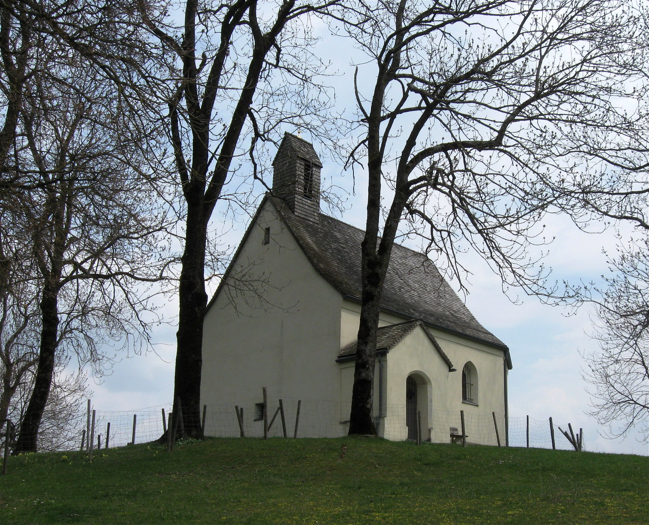 Kapelle St. Georg in Eulenschwang, einem Ortsteil von Egling